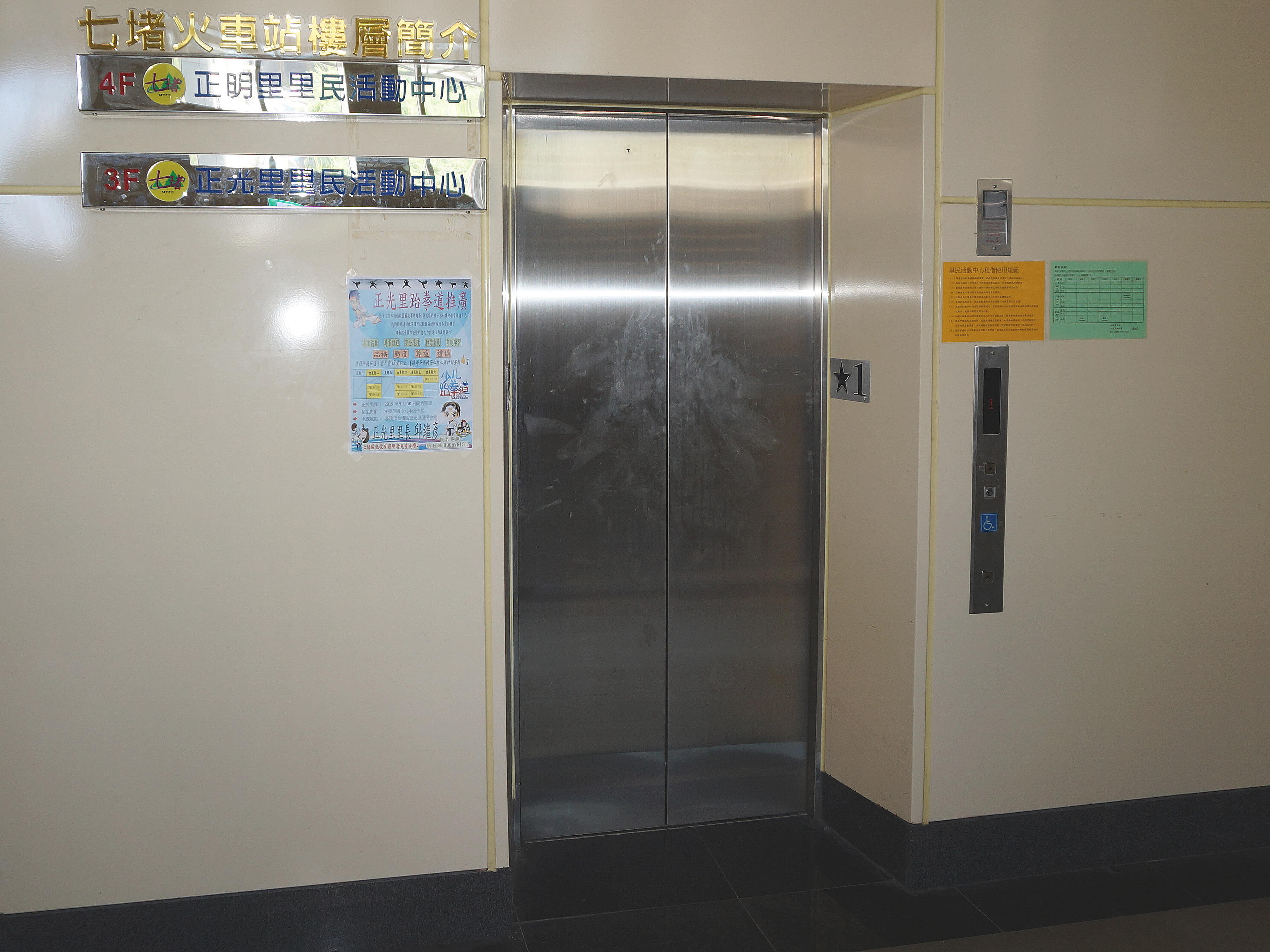 中文（台灣）: 臺灣鐵路管理局七堵車站1樓，通往正明里里民活動中心與正光里里民活動中心的電梯。